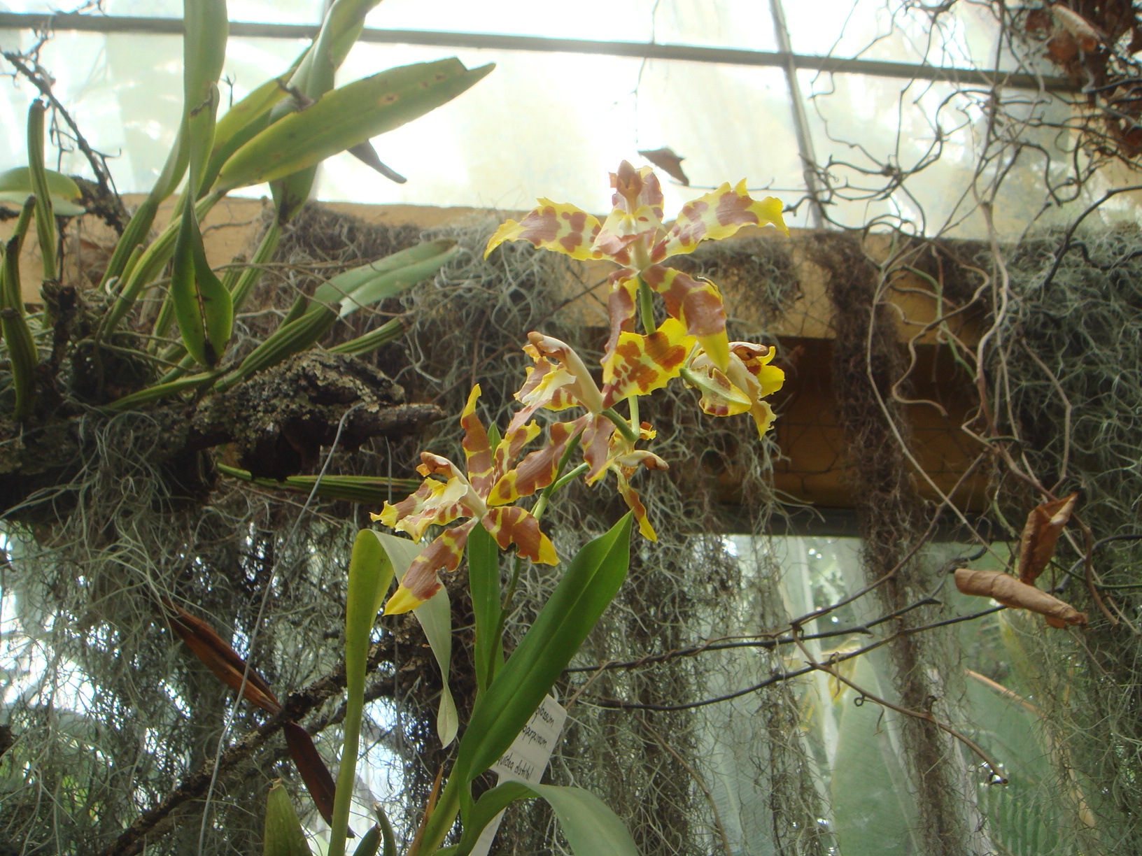 Orquídea distrital (Oncidium luteopurpureum), Bogotá, Colombia.